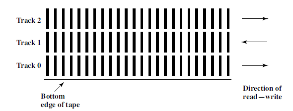 Shiriti magnetik